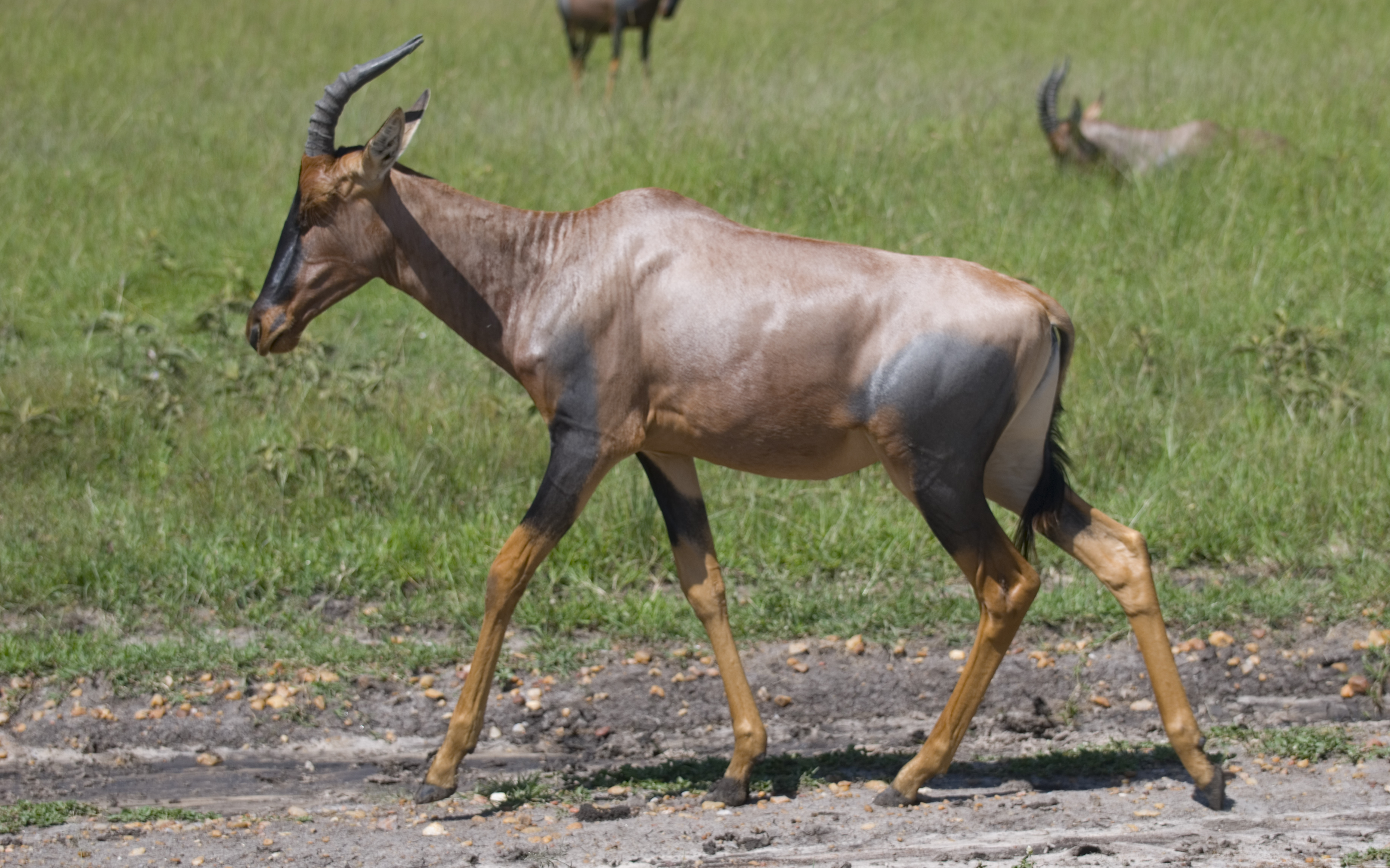 Topi (Damaliscus lunatus) in Masai Mara, Kenya